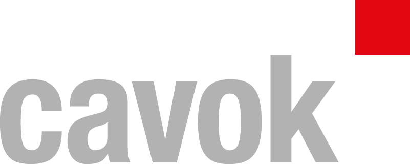 Logo des DAM-Systems cavok